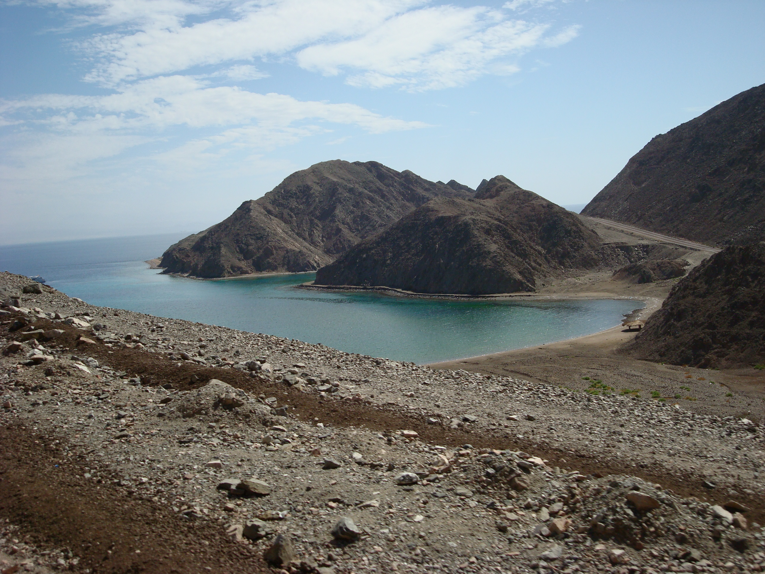 أحد المناظر الطبعية بمنطقة طابا